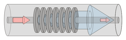 Long-period fiber grating